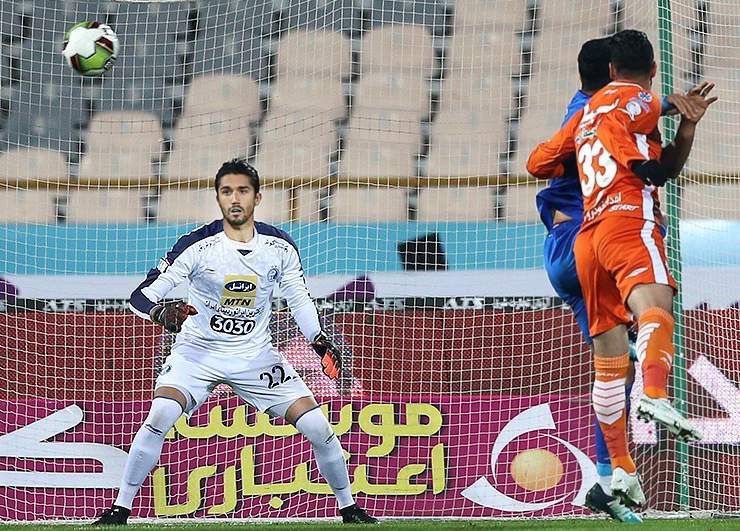 دیدار تیم های فوتبال استقلال و سایپا